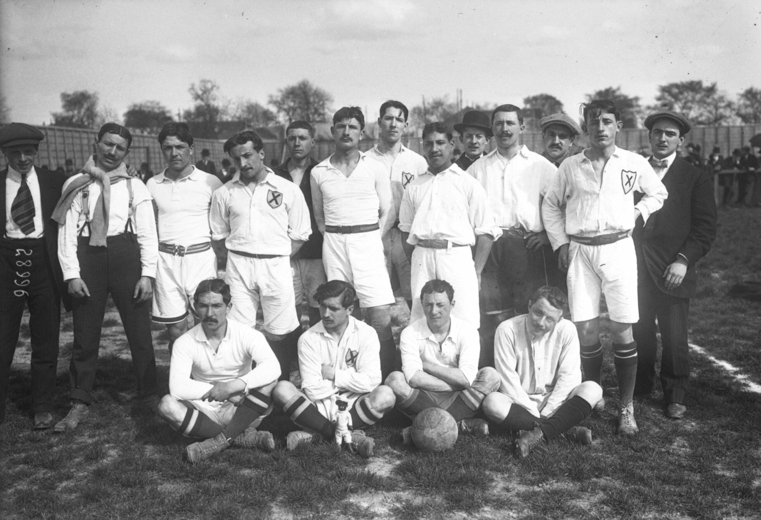 27 avril 1913 : équipe des « Bons gars de Bordeaux », finale de football de la Fédération gymnastique et sportive des patronages de France (FGSPF).